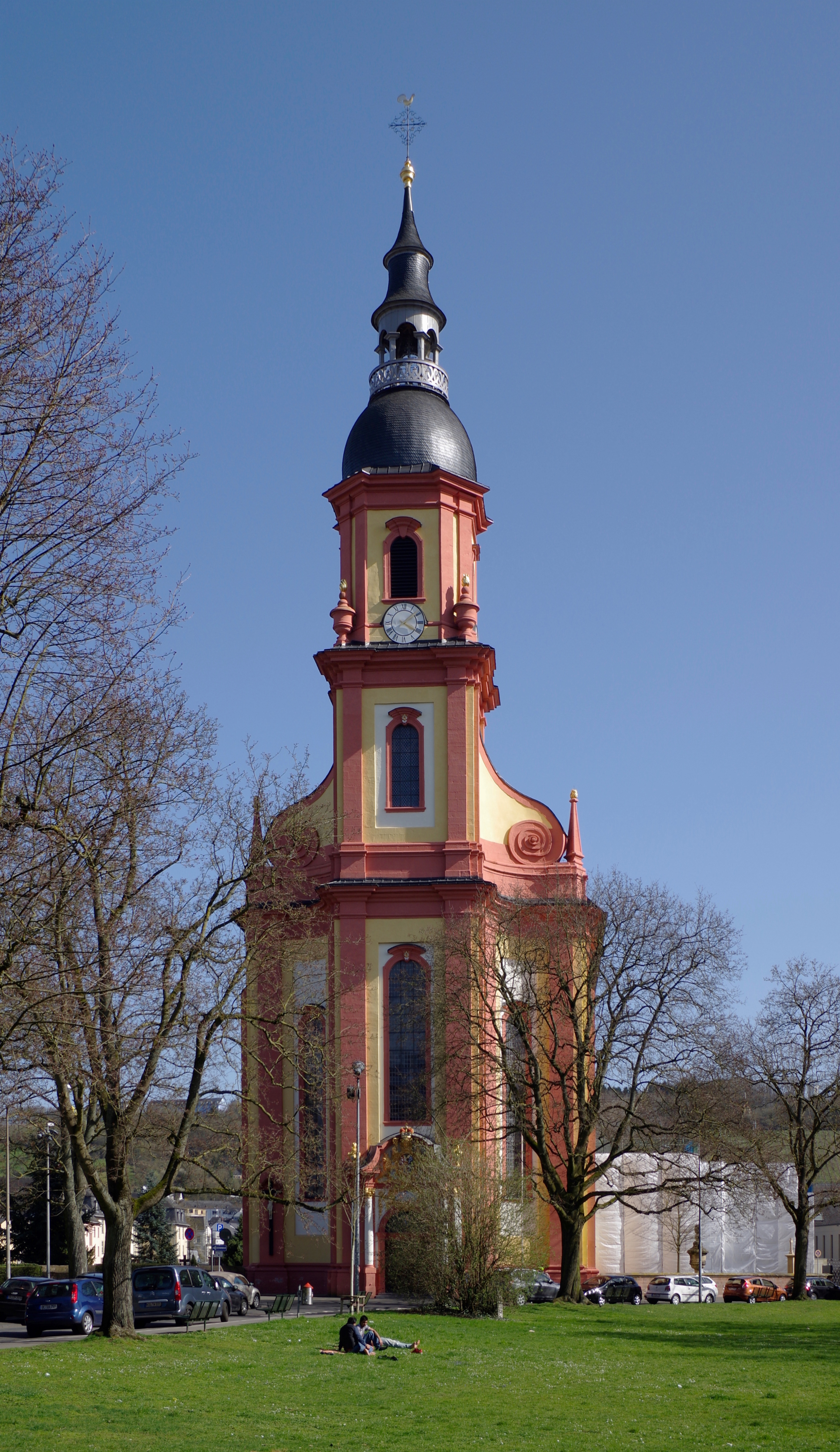 Trier, Kirche St. Paulin nach der Außenrenovierung von 2015